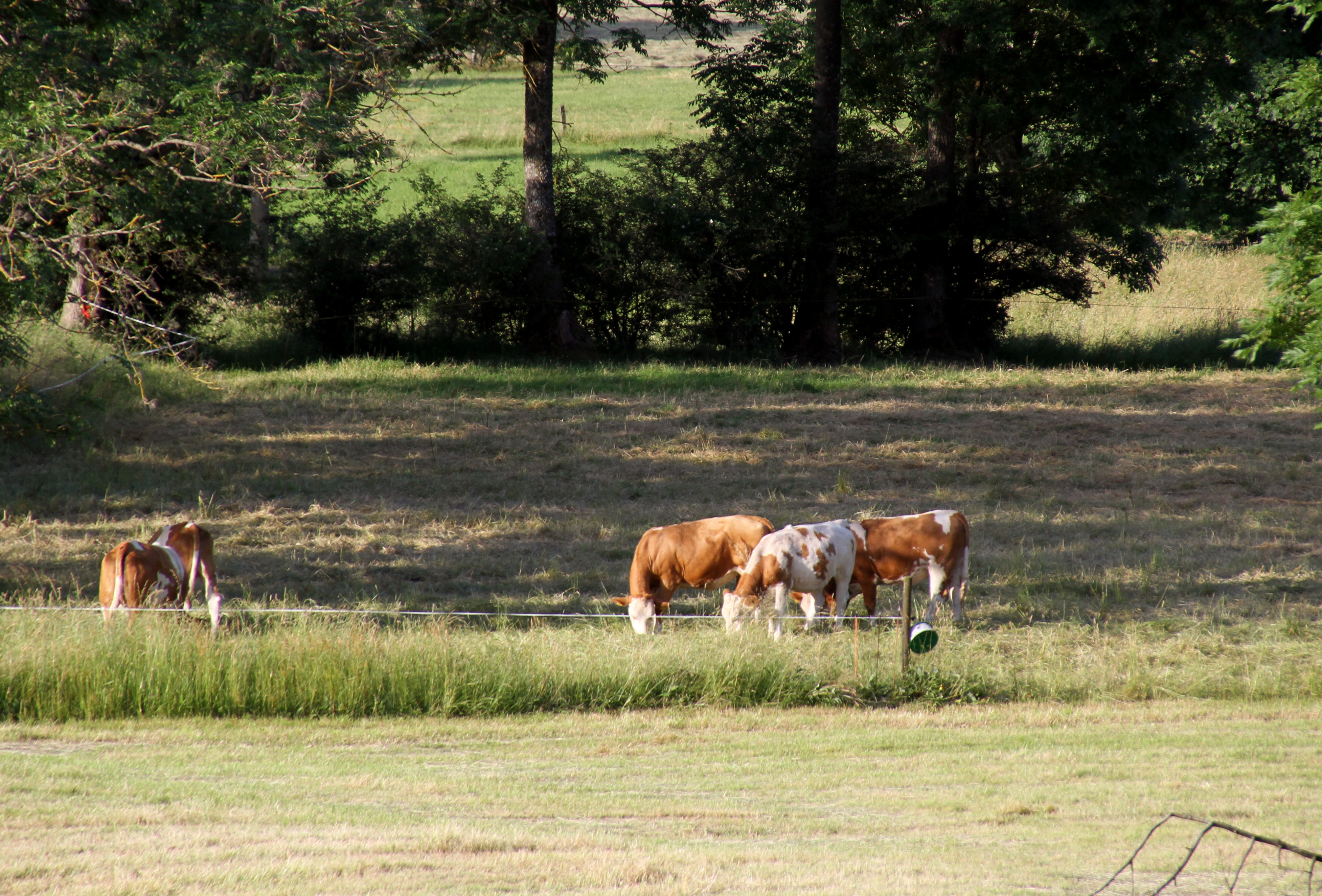 Maulkuppe in der Rhön in Hessen